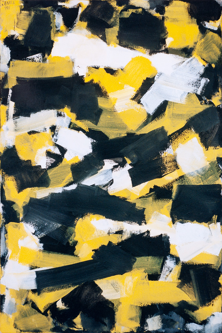 Acryl auf Leinwand, 100x180 cm, 1989, Ohne Titel